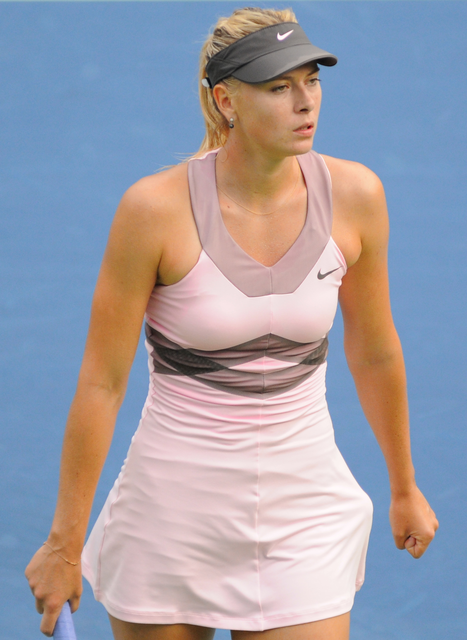 Maria Sharapova at US Open 2012.